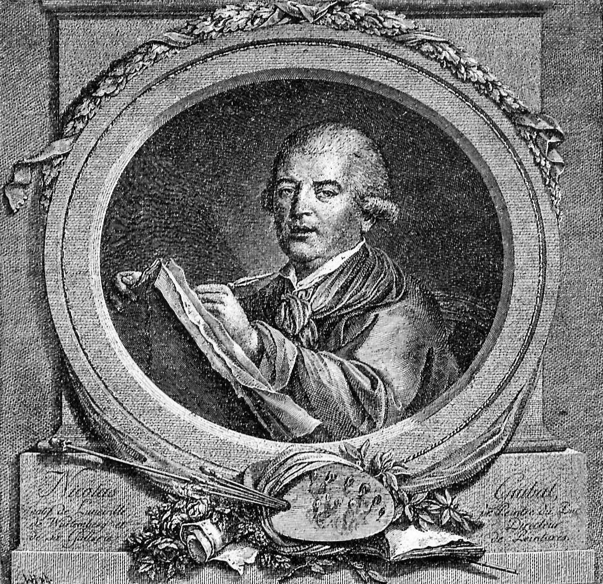 Porträt von Nicolas Guibal, um 1750.